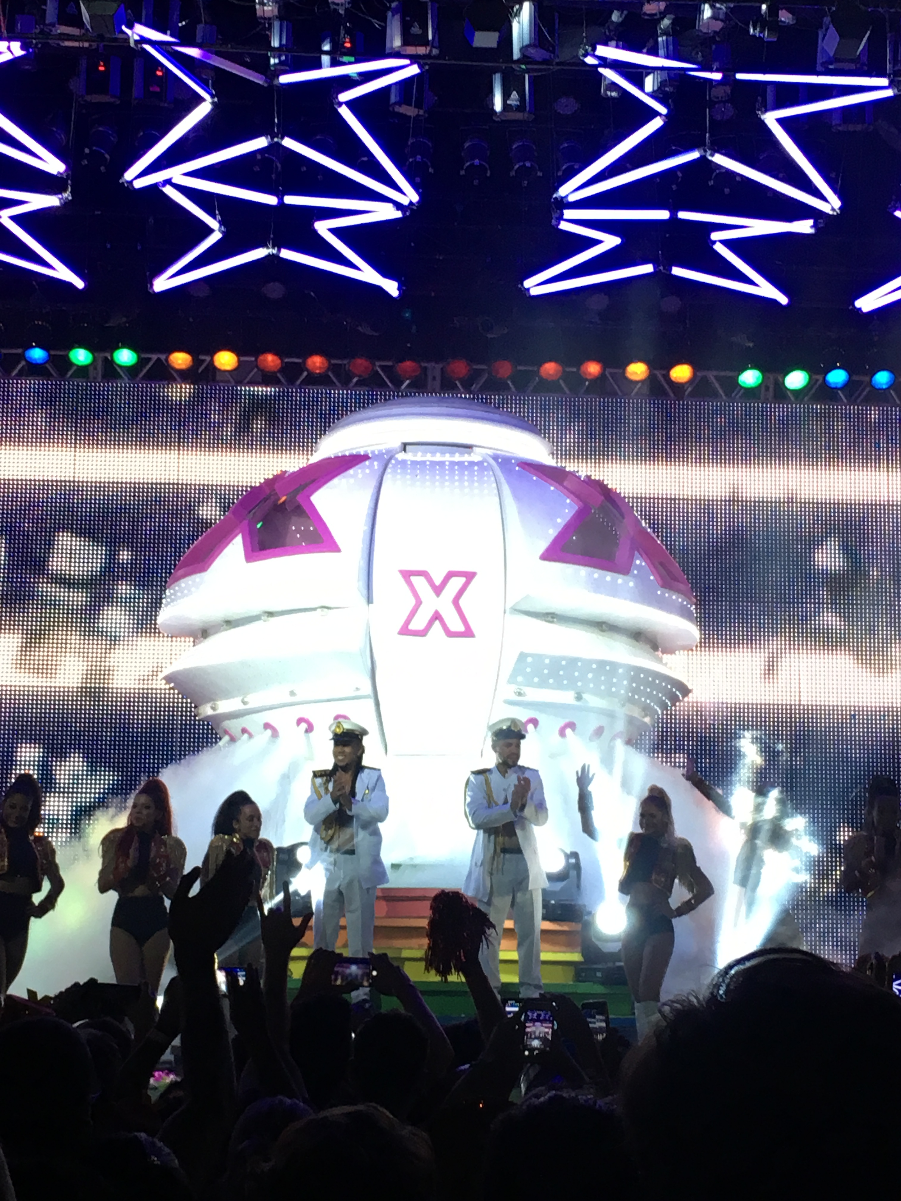 A icônica nave espacial de Xuxa, durante apresentação da turnê nacional XuChá no Metropolitan no Rio de Janeiro (2017).